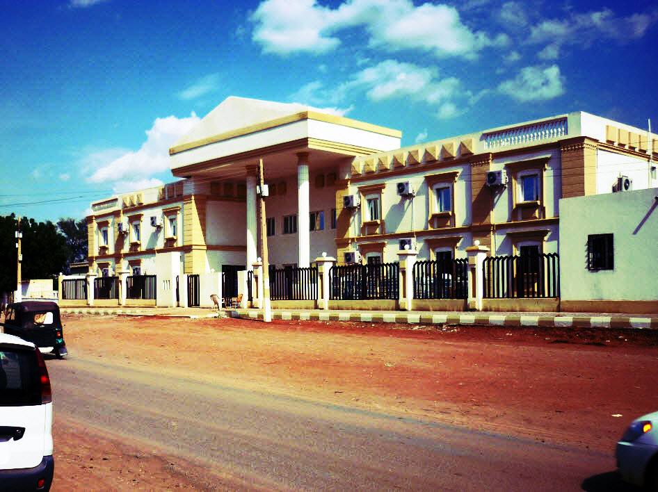 مبني المحكمة برفاعة